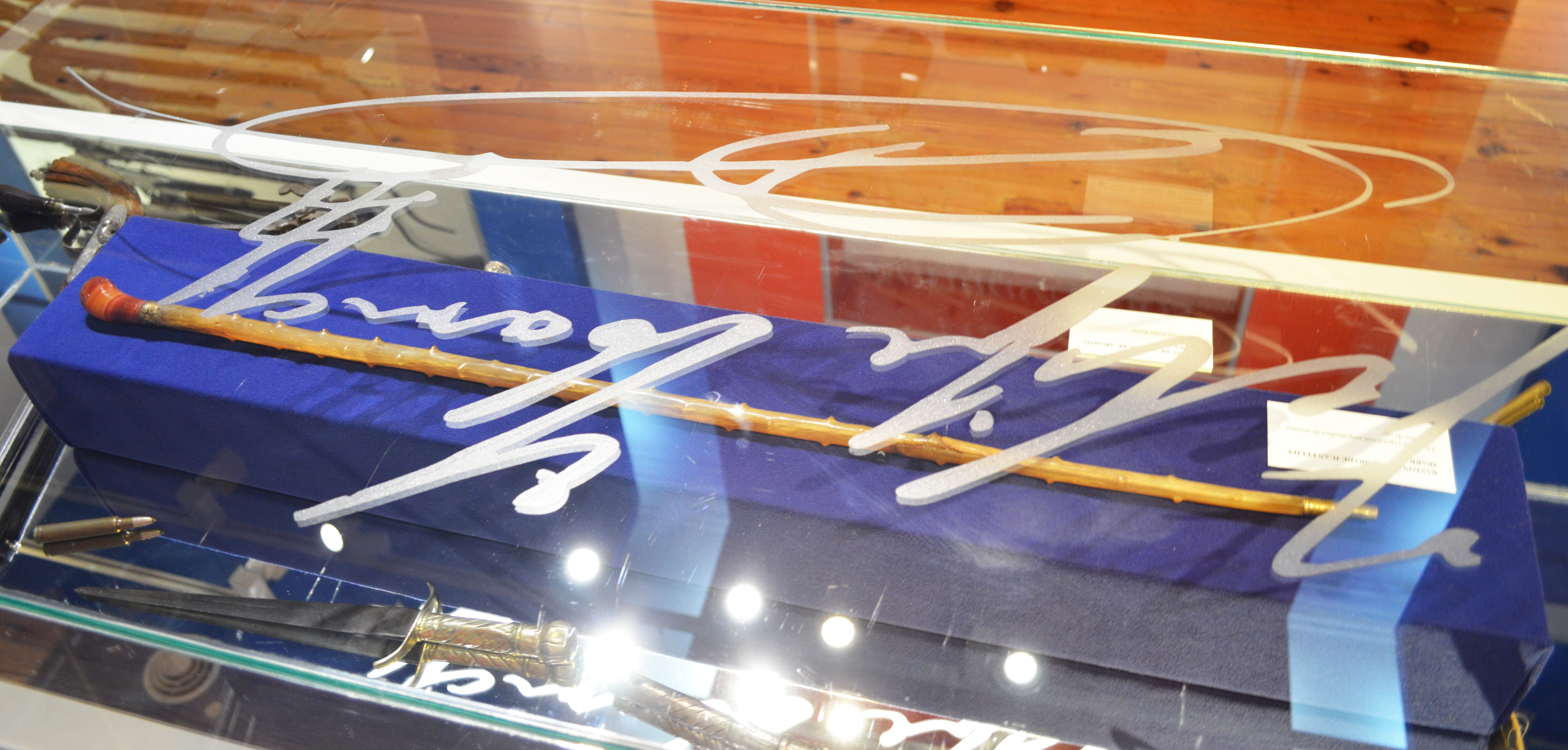 Bastón de mando de Juan Felipe Ibarra, exhibido en el Centro Cultural del Bicentenario de Santiago del Estero, Argentina. El mismo es de resina vegetal, con empuñadura de mesana y virutas de oro.